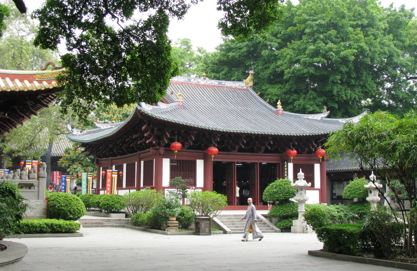 A mook in walking in Guangxiao Si Guangzhou, China.中国广州光孝寺。